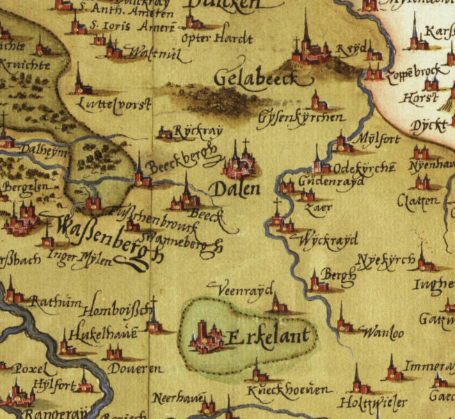 Ausschnitt aus einer regionalen Landkarte von Christian Sgrooten aus dem Jahr 1573. Zu sehen ist dort der Großraum Wickrath (Wyckrayd).